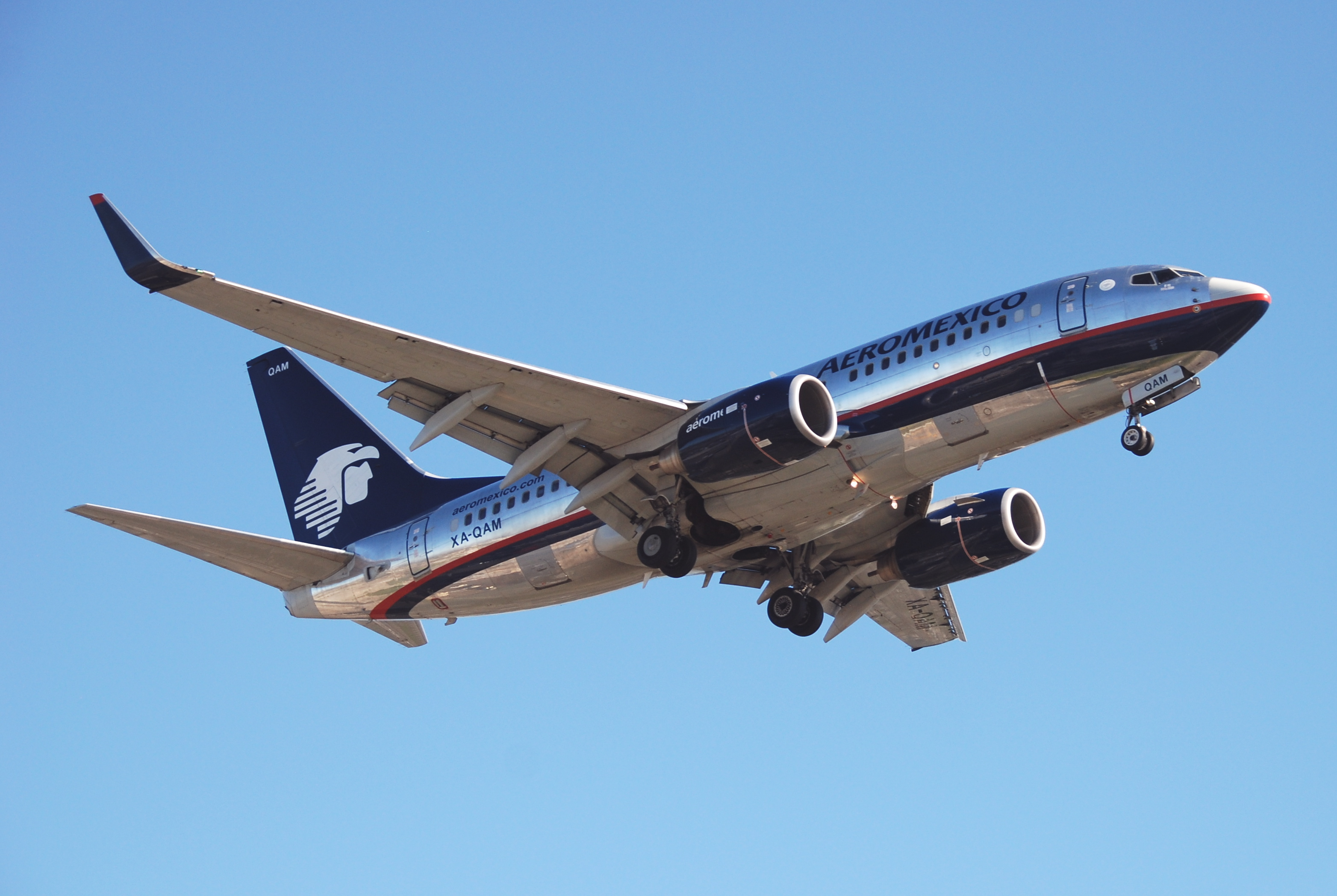 AeroMexico Boeing 737-700; XA-QAM@LAX;08.10.2011/620dm